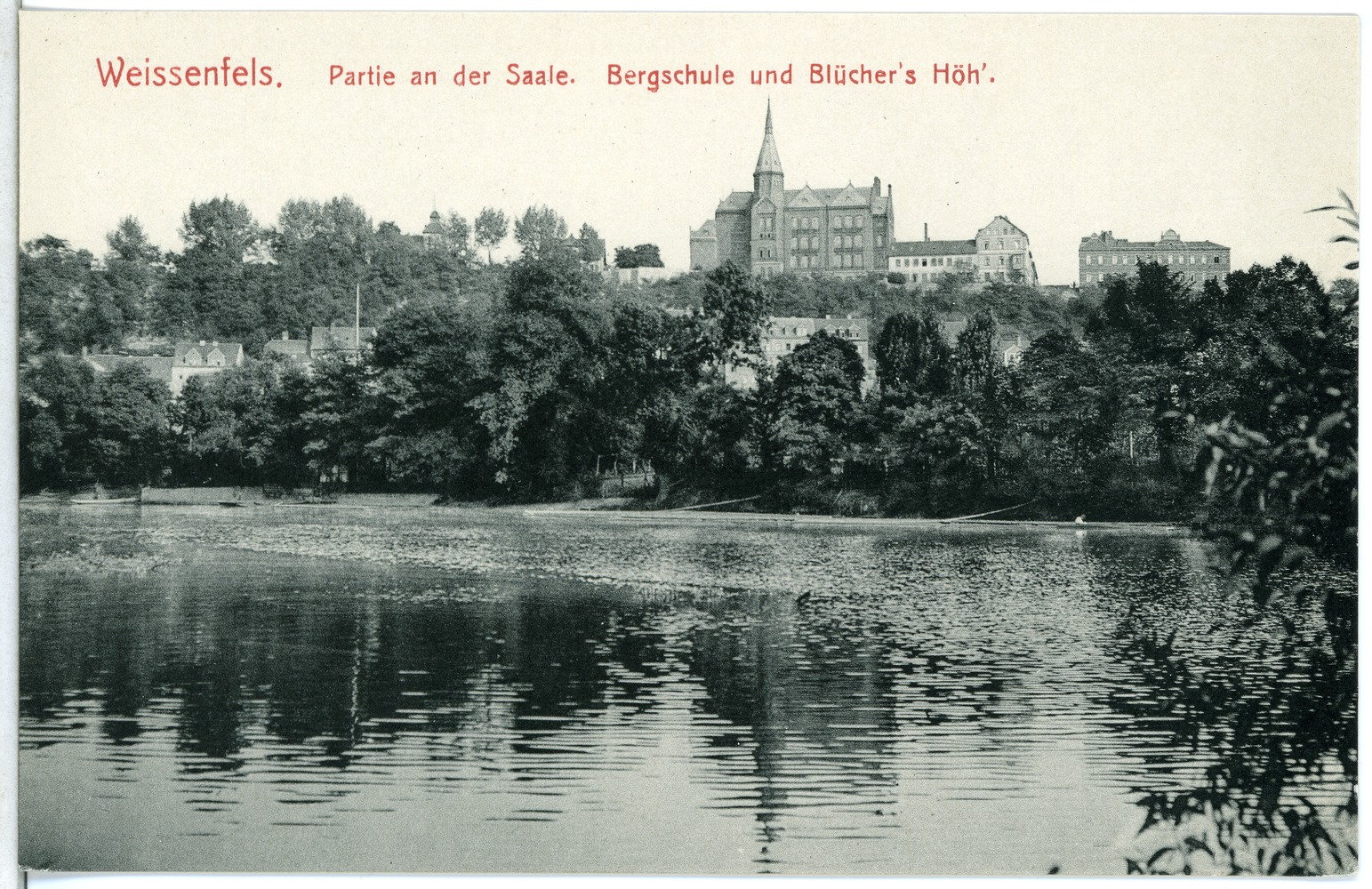 Weißenfels; Partie an der Saale Bergschule und Blüchershöhe This postcard is from publisher Brück & Sohn in Meißen ( postcard has a unique number 13905 and is available in a higher resolution at the publisher. This images was uploaded in a cooperation project between Wikipedians and the publisher.